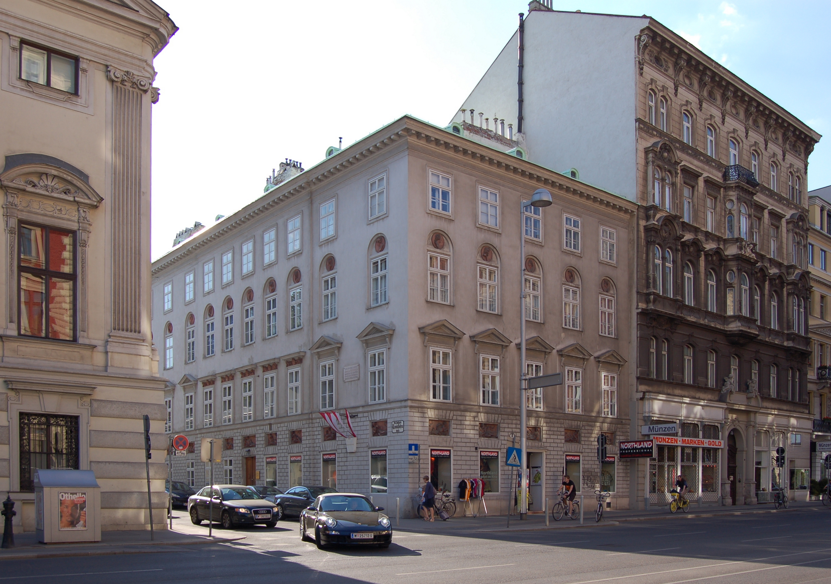 Das denkmalgeschützte Gebäude in der Trautsongasse 2 in Wien-Josefstadt.